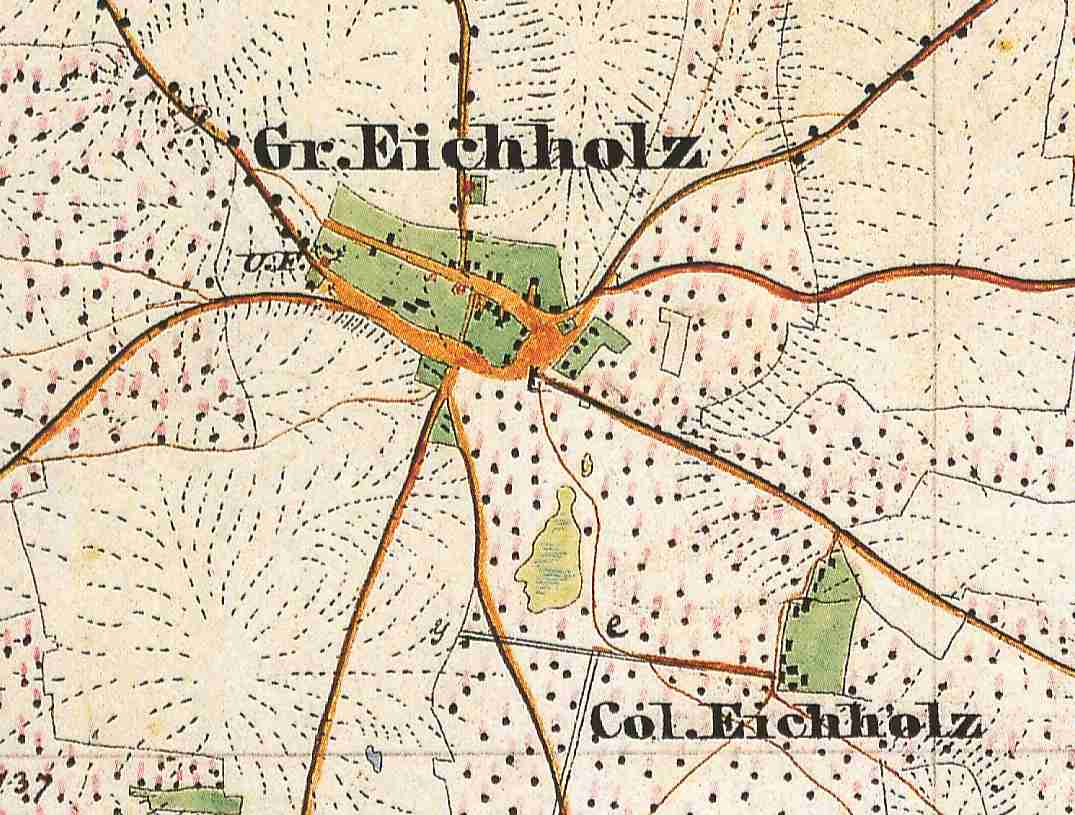 Groß Eichholz, Ortsteil der Stadt Storkow (Mark), Lkr. Oder-Spree, Brandenburg, Deutschland, Ausschnitt aus dem Urmesstischblatt 3849 Alt-Schadow von 1846